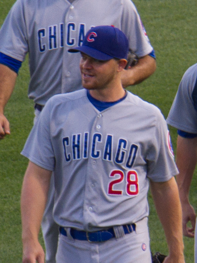 Michael Bowden